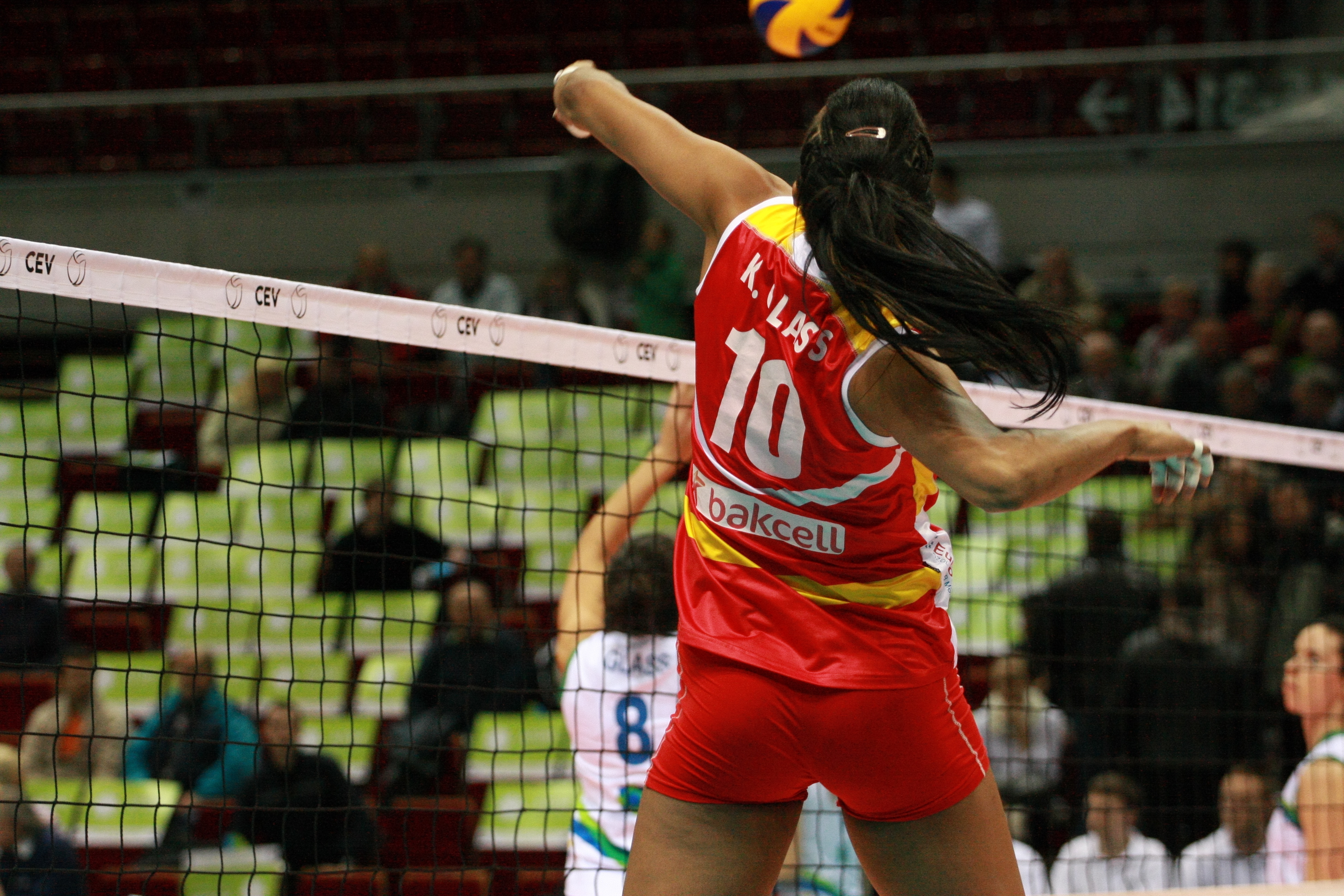 Atom Trefl Sopot vs Rabita Baku